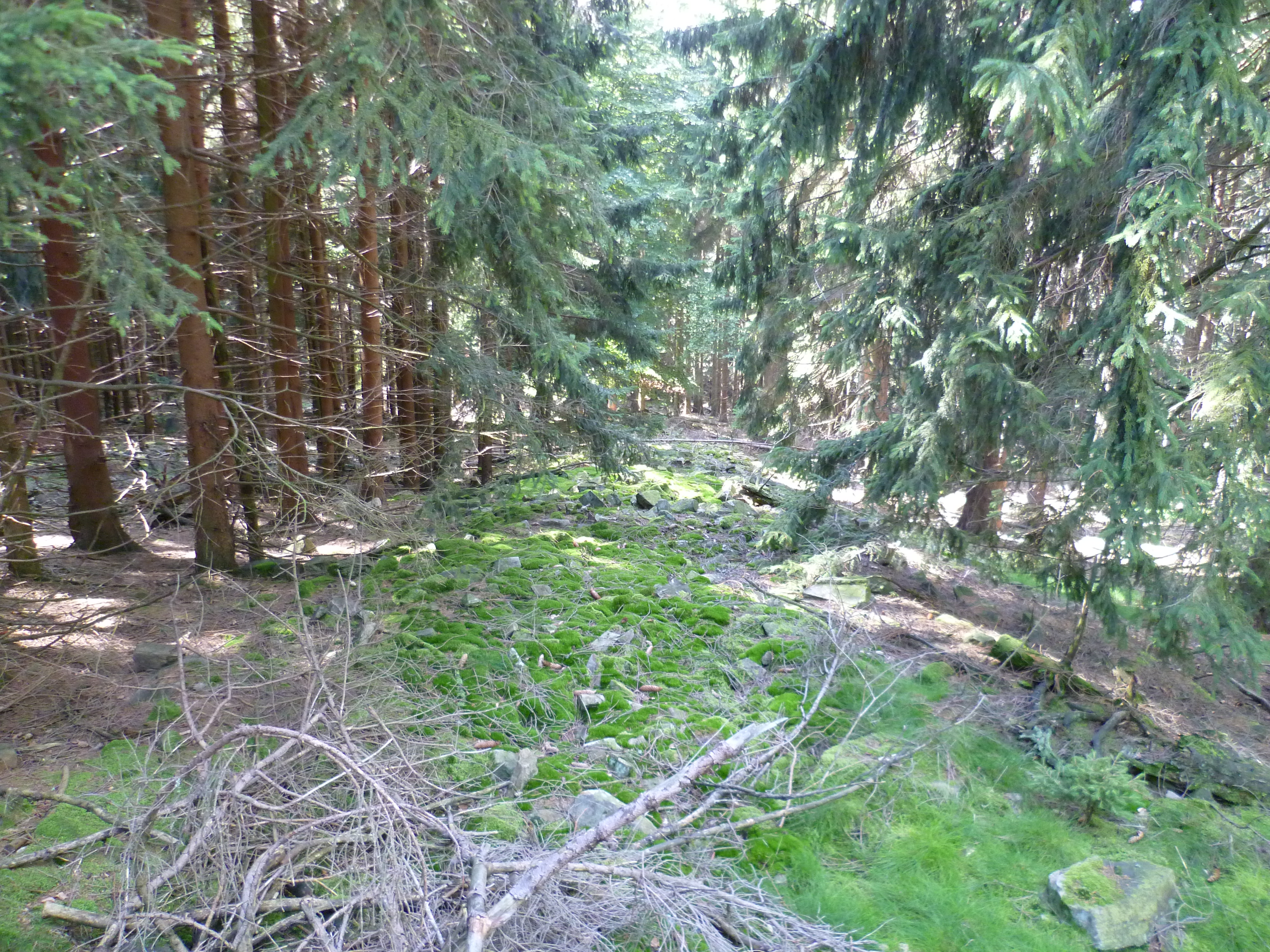 Der Annex des Ringwalls Altkönig im Westbereich.